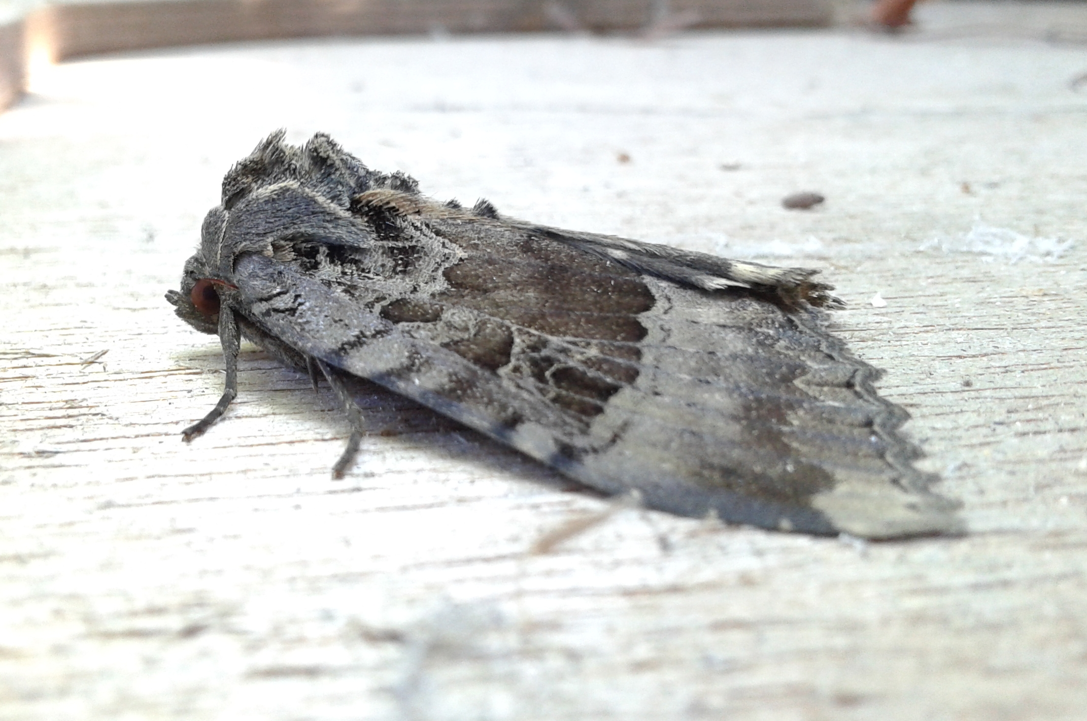 Mormo maura 59210 2017